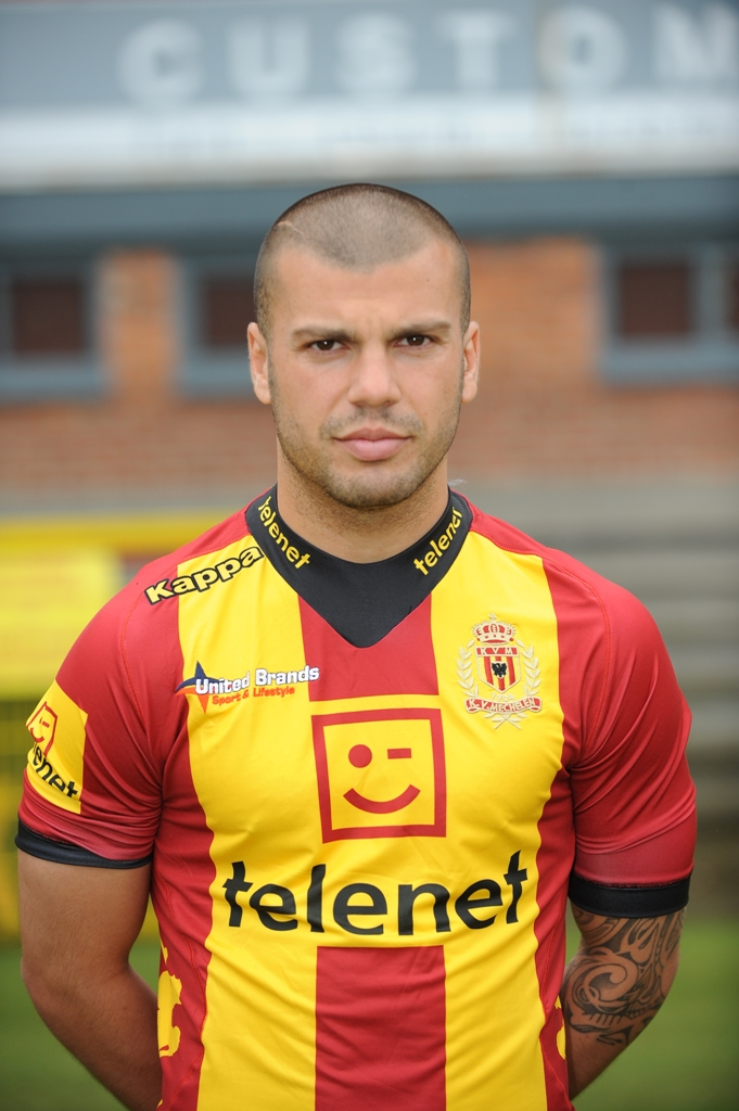 Belgisch voetballer, speelt momenteel voor KV Mechelen